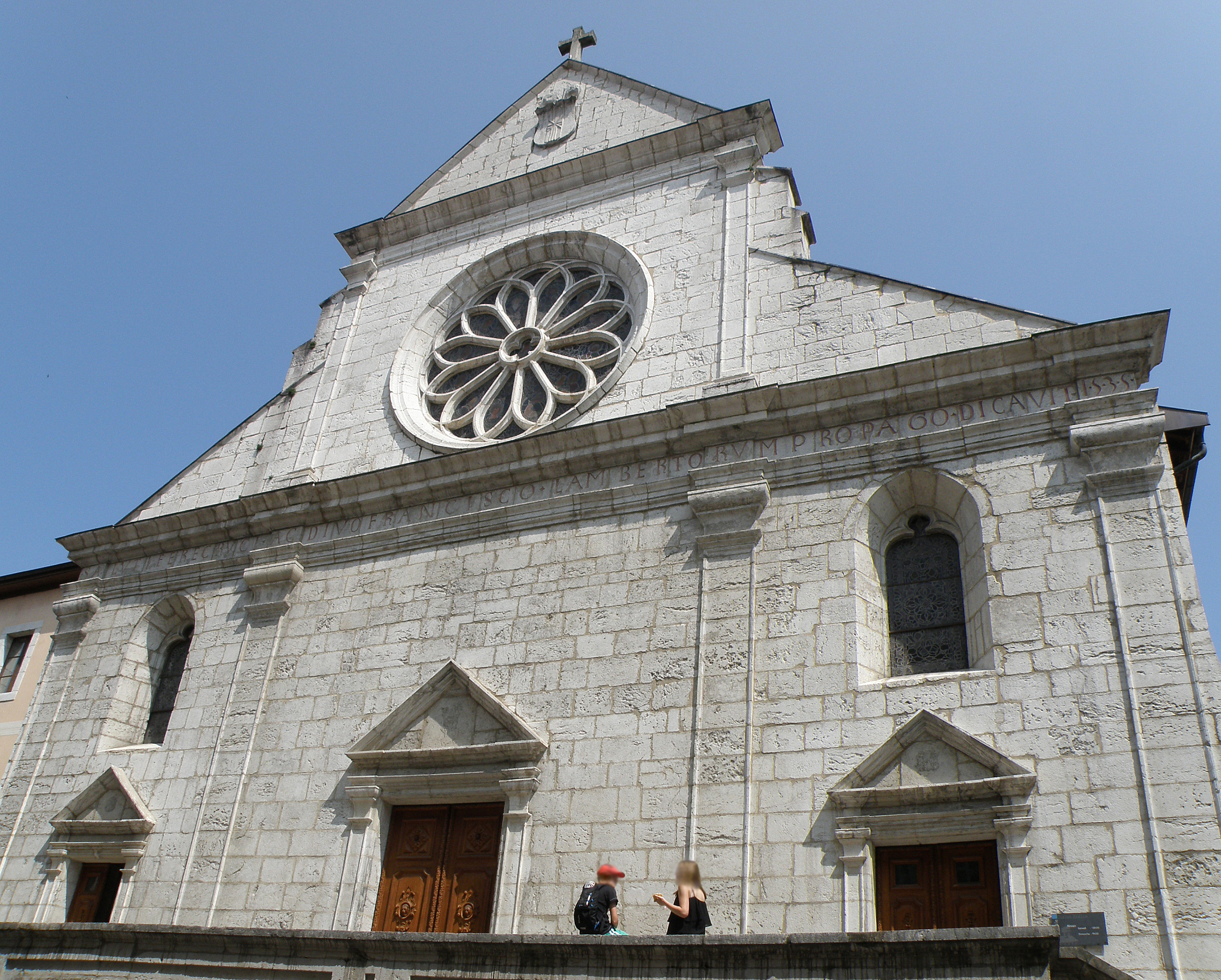 Annecy, ville et préfecture du département de la Haute-Savoie (région Rhône-Alpes, France). Cathédrale Saint-Pierre.